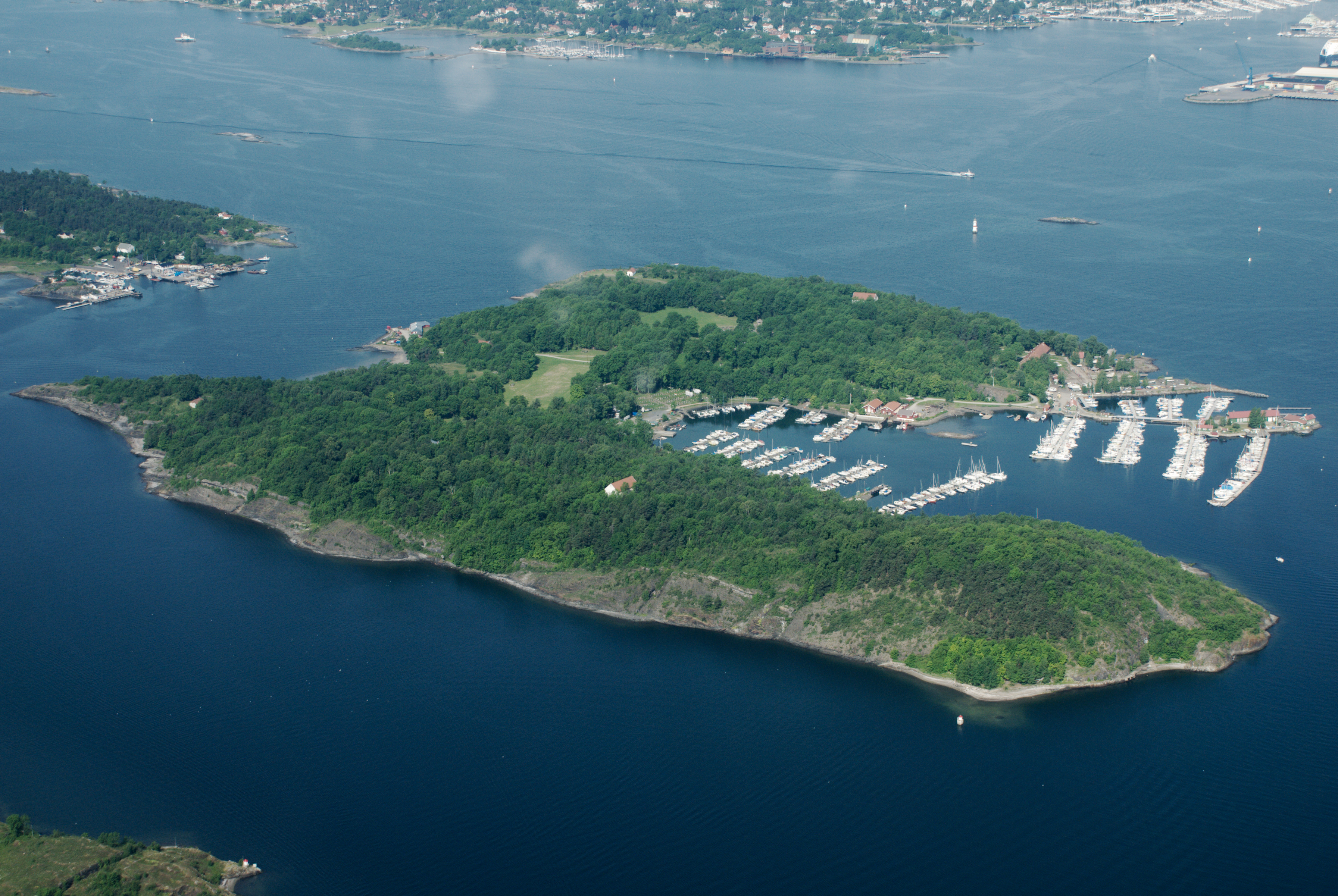 Hovedøya